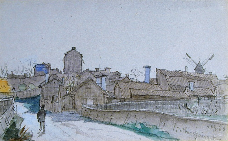 Kvarnen Fatburan november 1883